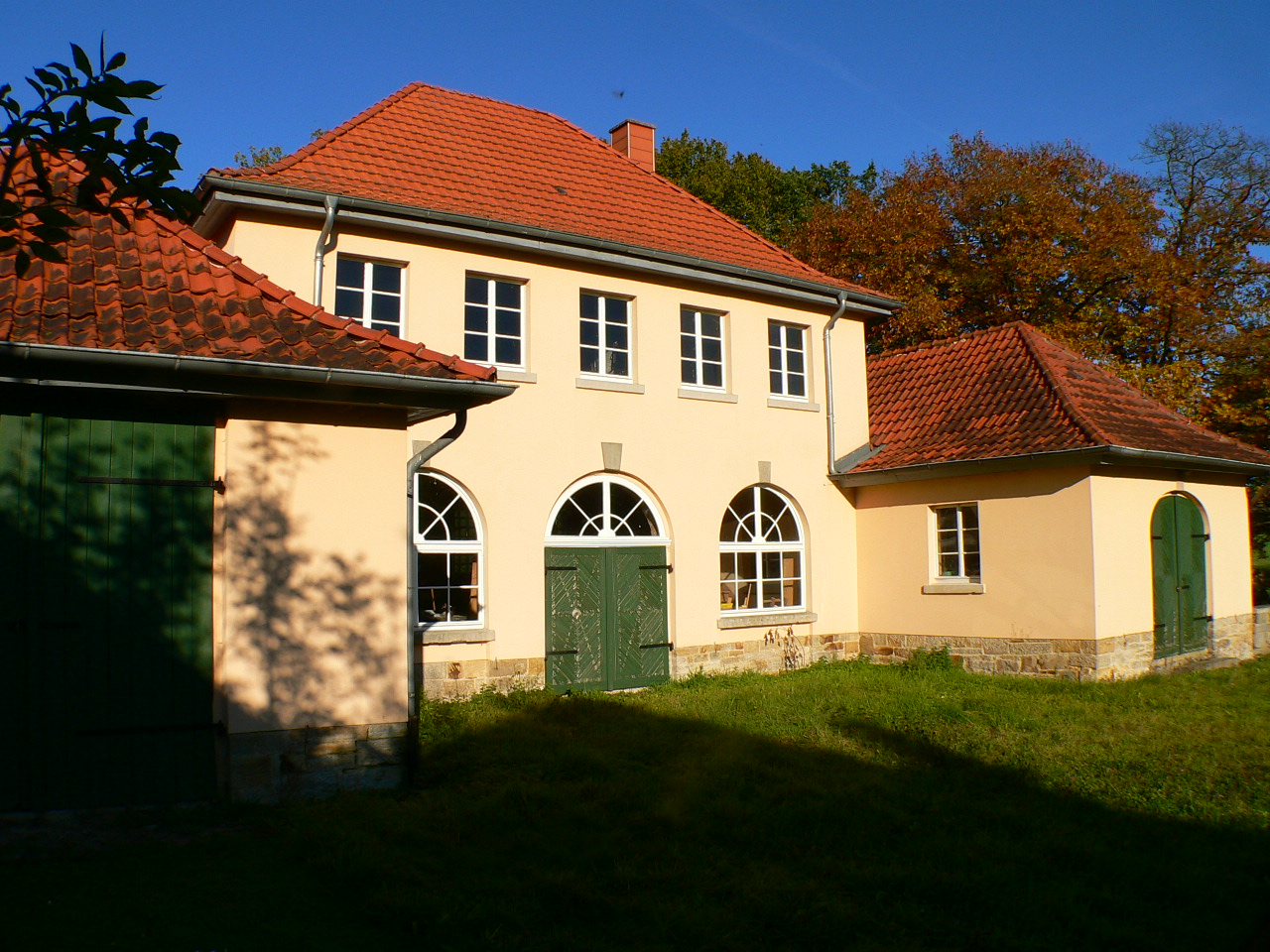 Domäne Beberbeck, Unterhof